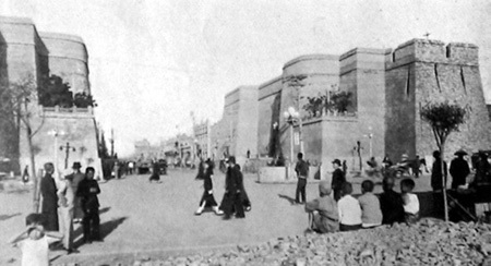 中文（中国大陆）: 沈阳大西门